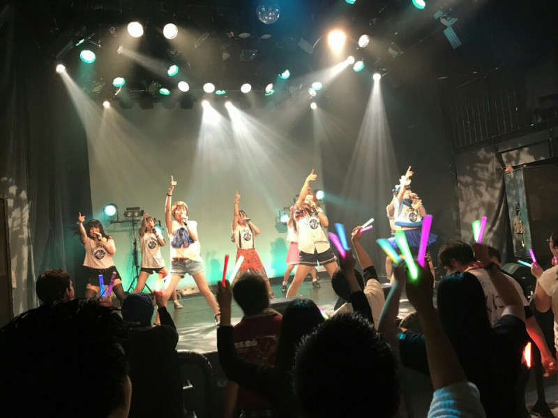 2016年12月23日AoNワンマンライブより